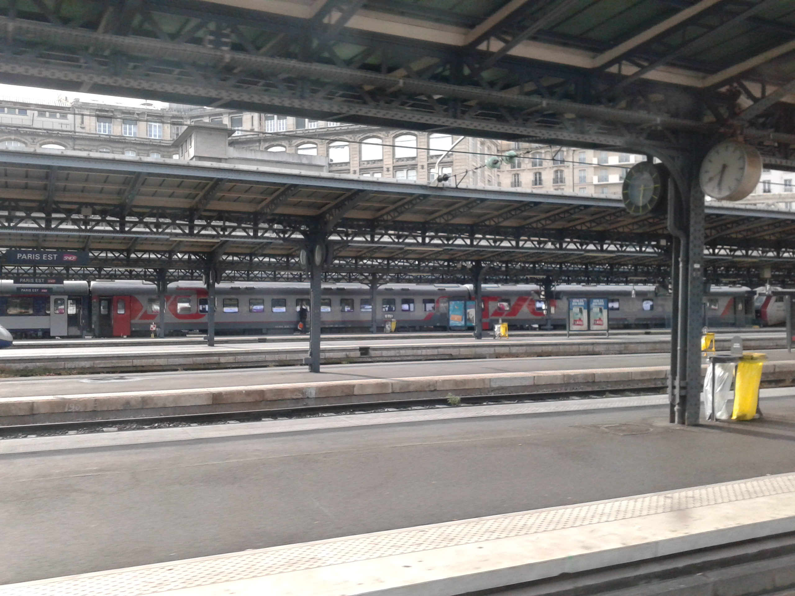 Aperçu d'une partie de la rame stationnée en gare de l'Est en arrière plan.